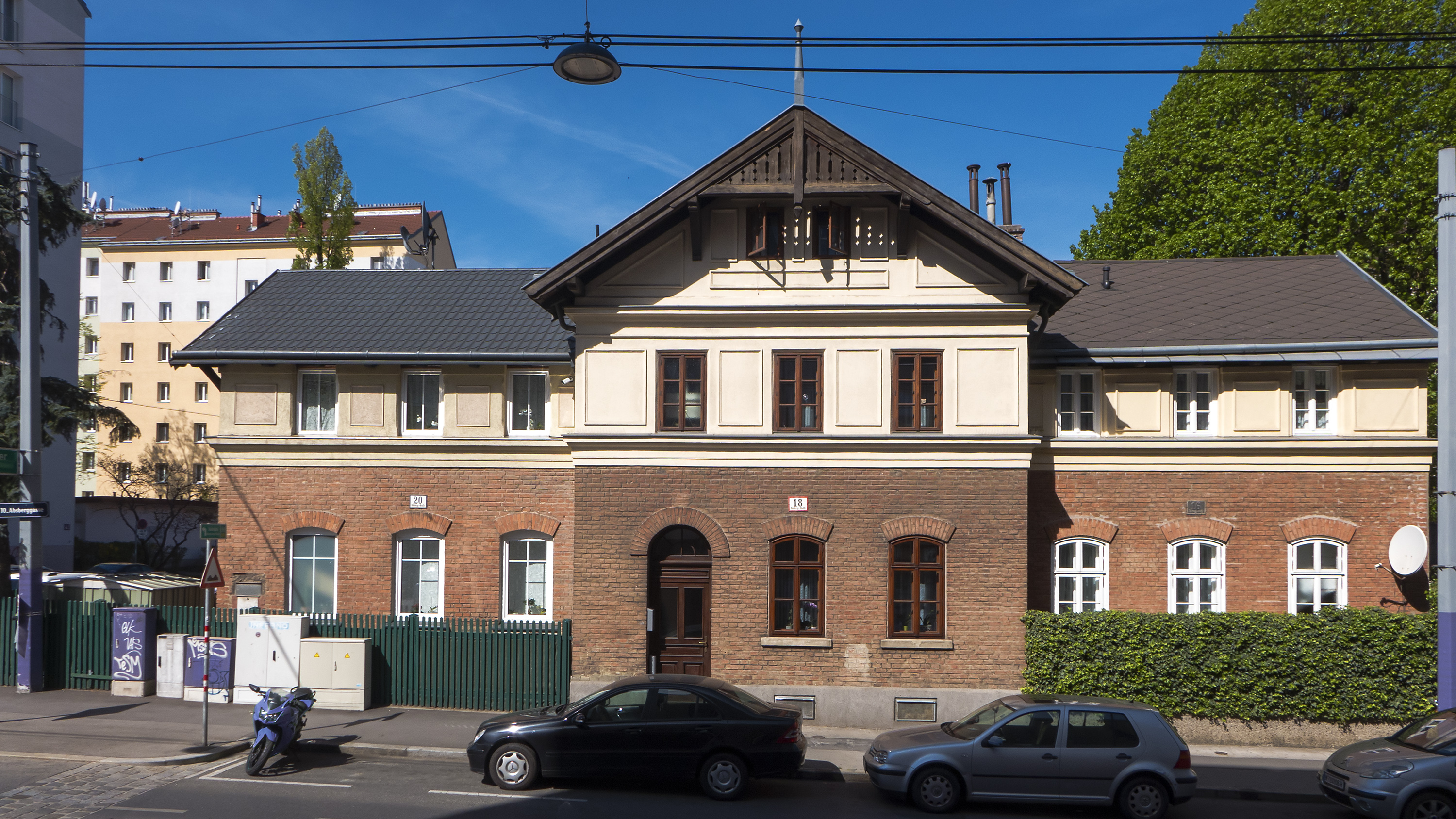 Arbeiter-Cottage Favoriten in Wien 10, Straßenfront Absberggasse